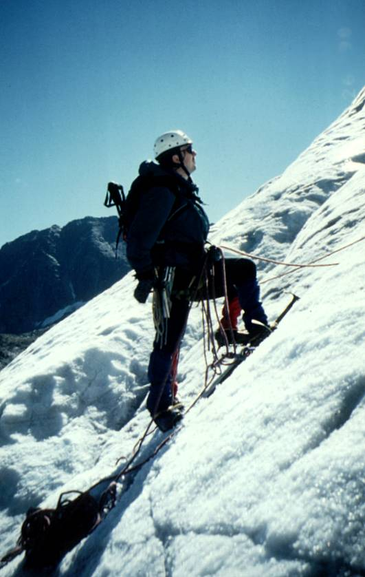 Auf dem Sulzenaugletscher unterhalb des Zuckerhütls im Auftrag von Hejkal fotografiert von R. Reinhold